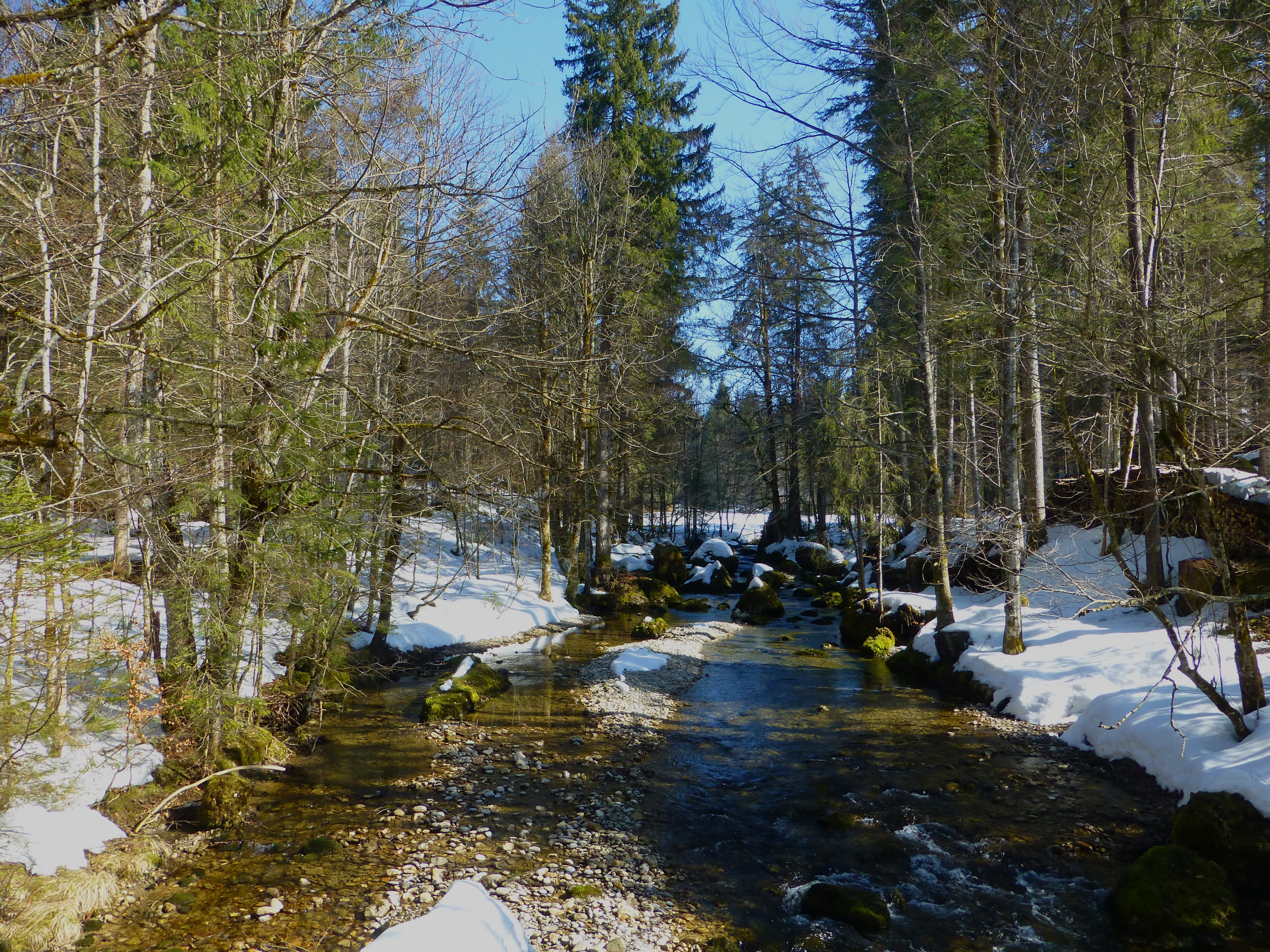 Die Leckner Ach bei Hittisau.